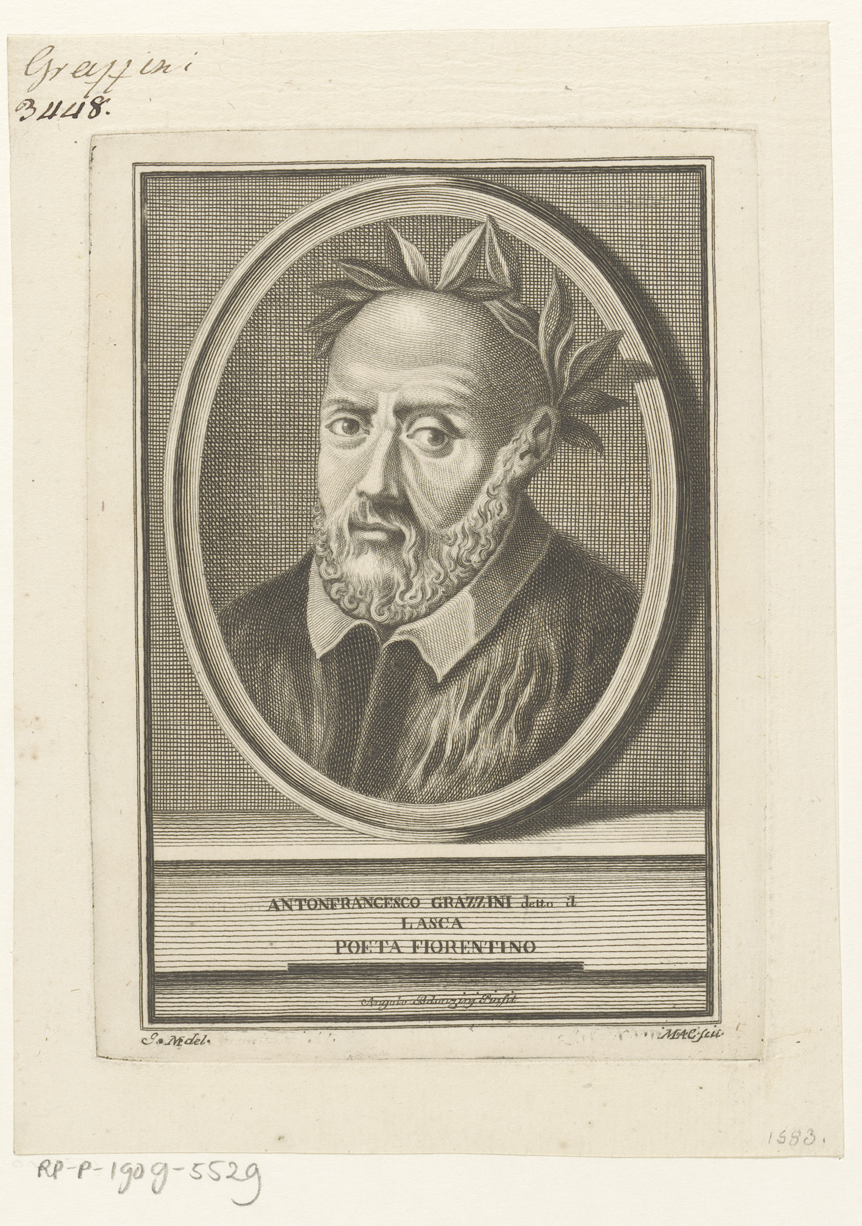 IdentificatieTitel(s): Portret van liedschrijver Anton Francesco GrazziniPortretten van schrijvers die liederen schreven voor Lorenzo de'Medici (serietitel)Objecttype: prent boekillustratie Objectnummer: RP-P-1909-5529Opschriften / Merken: verzamelaarsmerk, verso, gestempeld: Lugt 2228opschrift, recto boven, handgeschreven in bruine inkt: ‘Grazzini / 3448’VervaardigingVervaardiger: prentmaker: Monogrammist MAC (vermeld op object)naar tekening van: Monogrammist JM (vermeld op object)uitgever: CosmopoliPlaats vervaardiging: prentmaker: Italiënaar tekening van: Italiëuitgever: LuccaDatering: 1750Fysieke kenmerken: gravureMateriaal: papier Techniek: graveren (drukprocedé)Afmetingen: plaatrand: h 155 mm × b 112 mmToelichtingPrent gebruikt voor Grazzini, Anton Francesco. Tutti i trionfi, carri, mascherate o canti carnascialeschi andati per Firenze dal tempo del Magnifico Lorenzo de' Medici fino all' anno 1559 : in questa seconda edizione corretti, con diversi MSS. collazionati, delle loro varie lezioni arricchiti, notabilmente accresciuti, e co' ritratti di ciascun poeta adornate. Lucca: Cosmopoli, 1750.OnderwerpWat: historical personsportrait of a writerwriter, poet, authorWie: Anton Francesco GrazziniVerwerving en rechtenVerwerving: aankoop 1905Copyright: Publiek domein